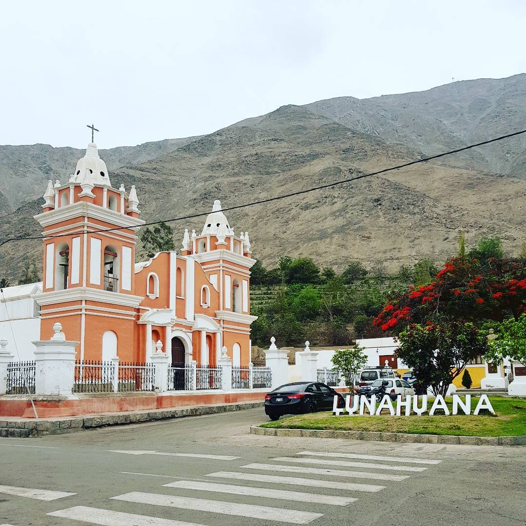 Plaza de Lunahuana